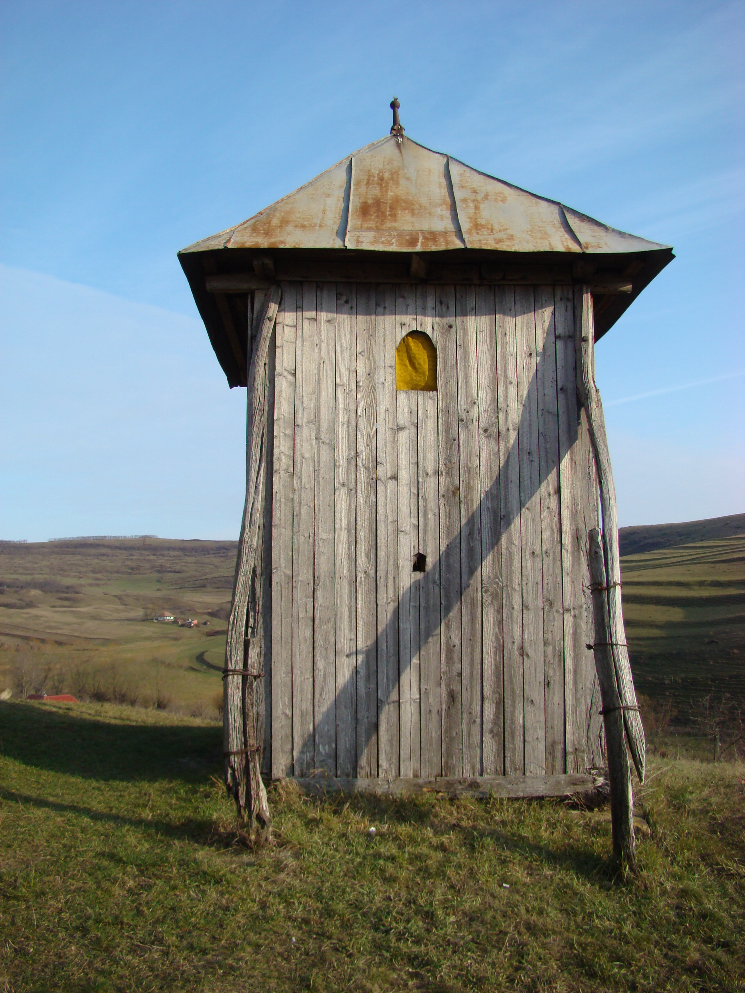 Biserica de lemn „Sf.Arhangheli” din Crișeni, județul Cluj